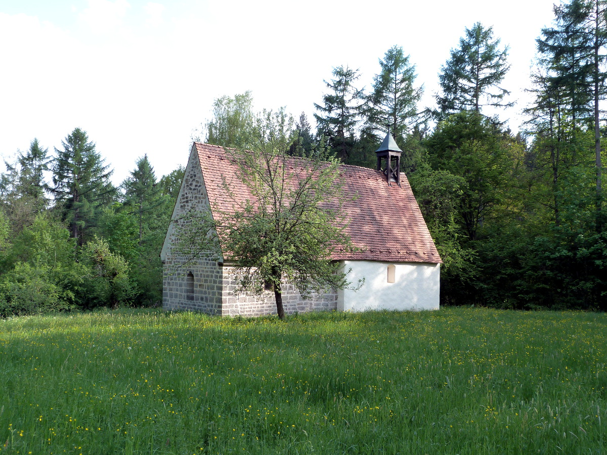 (LSG:BW-1.36.029)_Keuerstadt und Umgebung, Kapelle St. Nikolaus